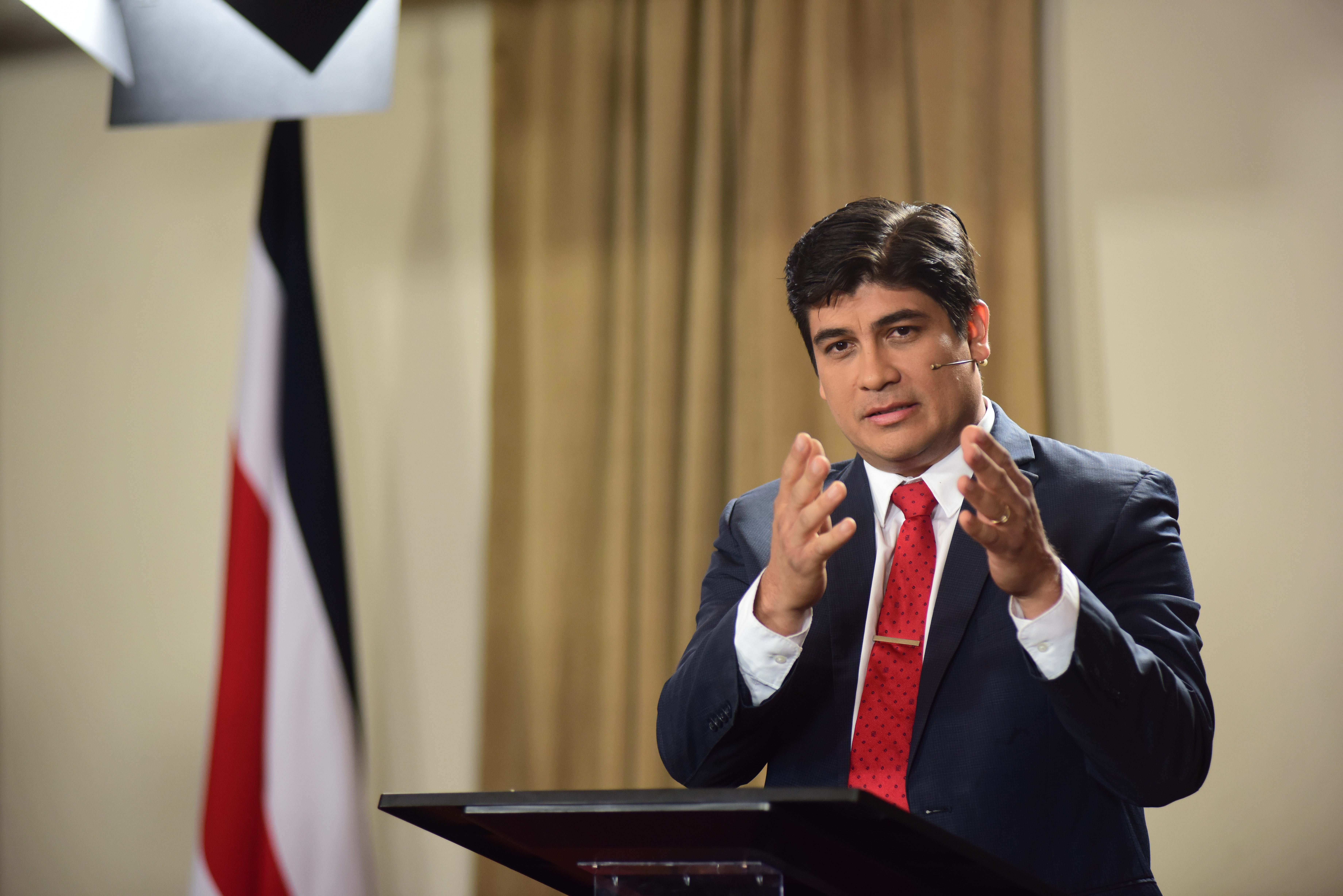 Carlos Alvarado, presidente electo de Costa Rica 2018-2022.